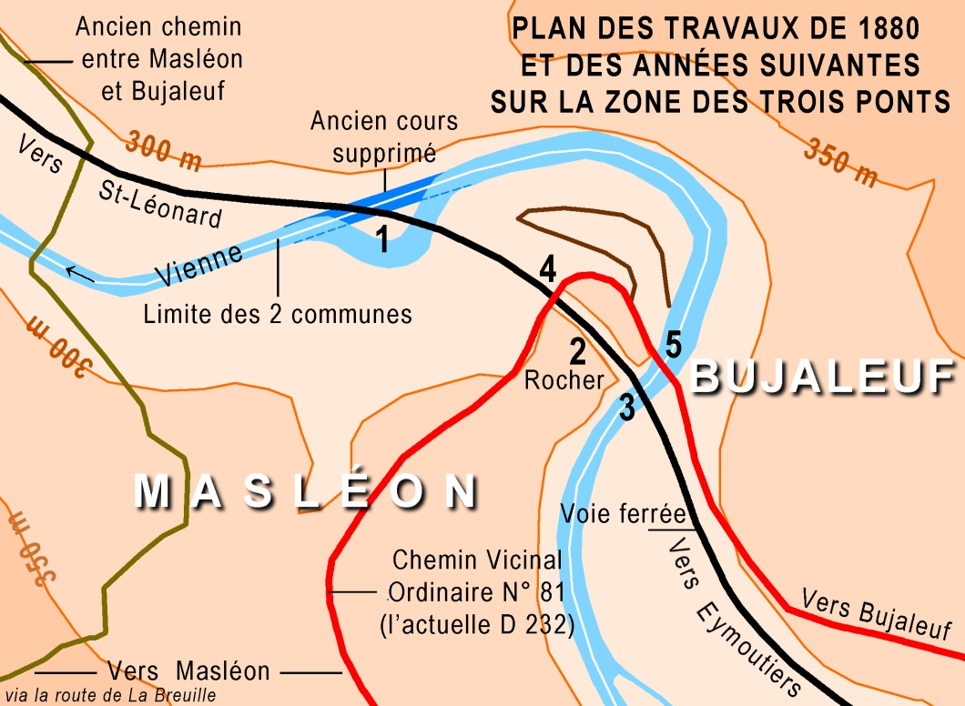 Zone des travaux autours de 1880